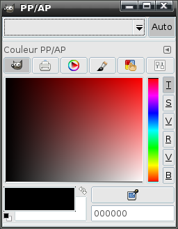 Boite à dialogue de gestion des couleur de premier et d'arrière plan sous gimp